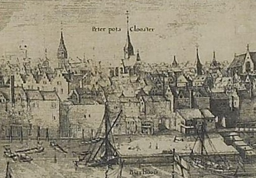 De Sint-Salvator- of Pieter Potabdij in het begin van de 17e eeuw (afbeelding door Jan-Baptist Vrients - Redegezicht Antwerpen)